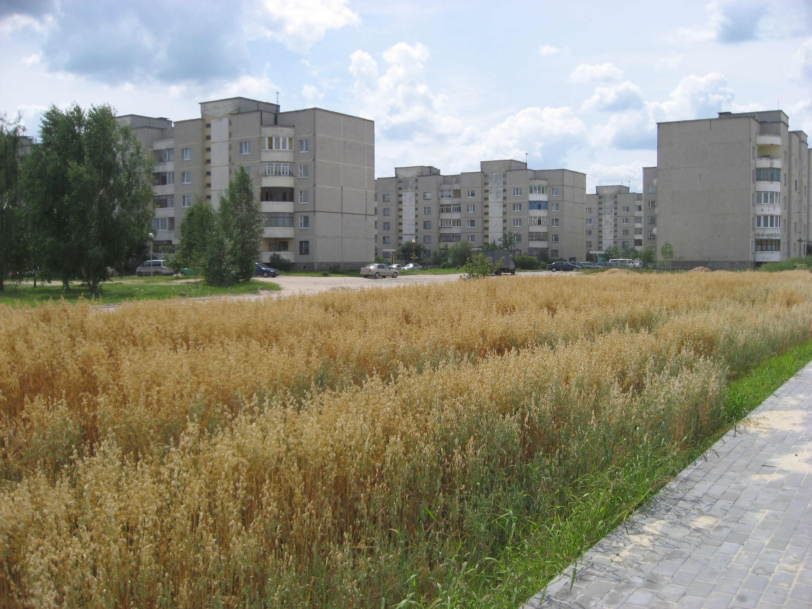 Белоозёрск, ул. Глинского. Спальный район